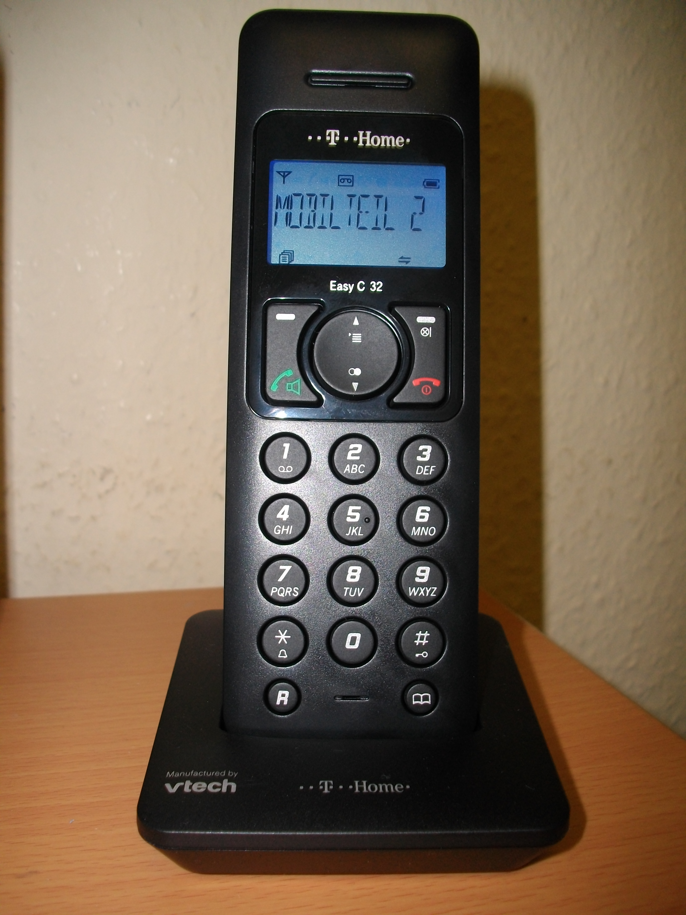 Zweites Mobilteil der T-Home easy CA-32 Serie